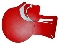 Verlegung der Atemwege durch die Zunge am Kopfschnittmodell